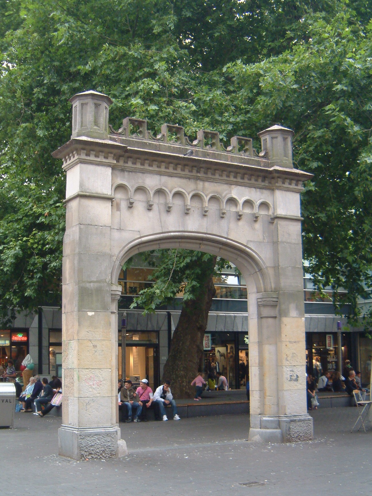 Coolsingelziekenhuispoort